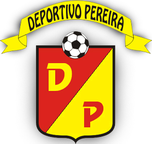 Escudo del equipo de futbol Colombiano Deportivo Pereira